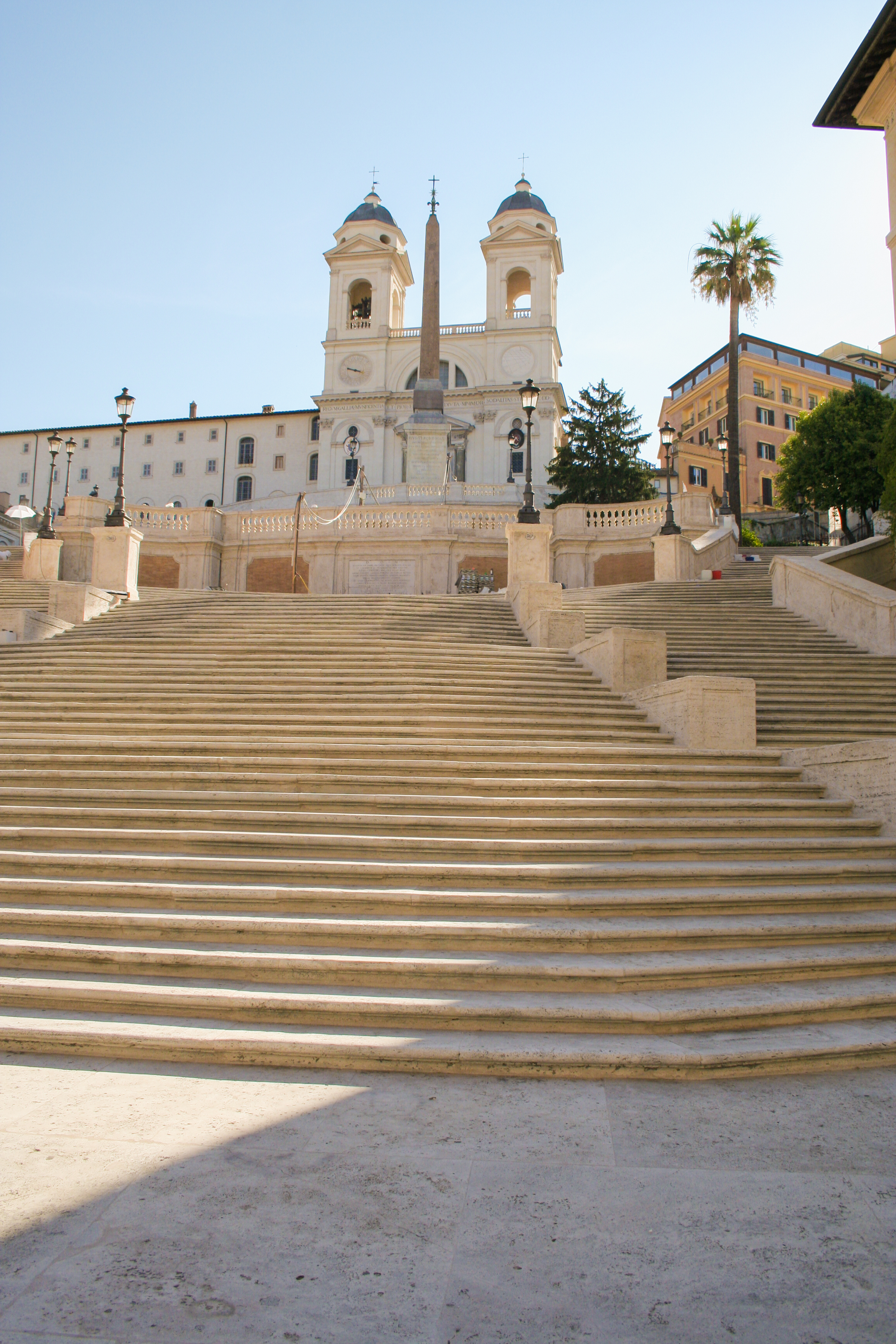 Eglise de la Trinité-des-Monts à Rome